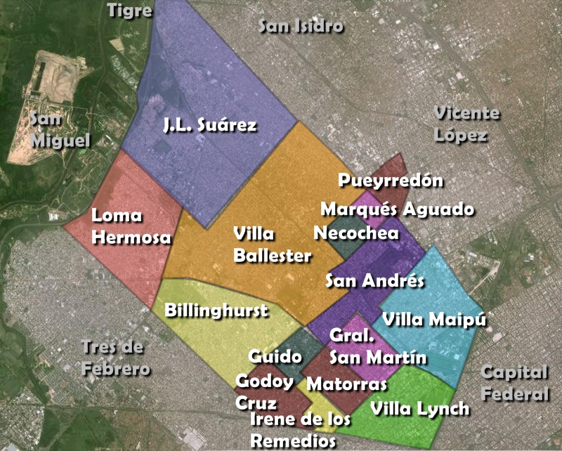 Mapa que muestra las localidades del partido de General San Martín, Buenos Aires.